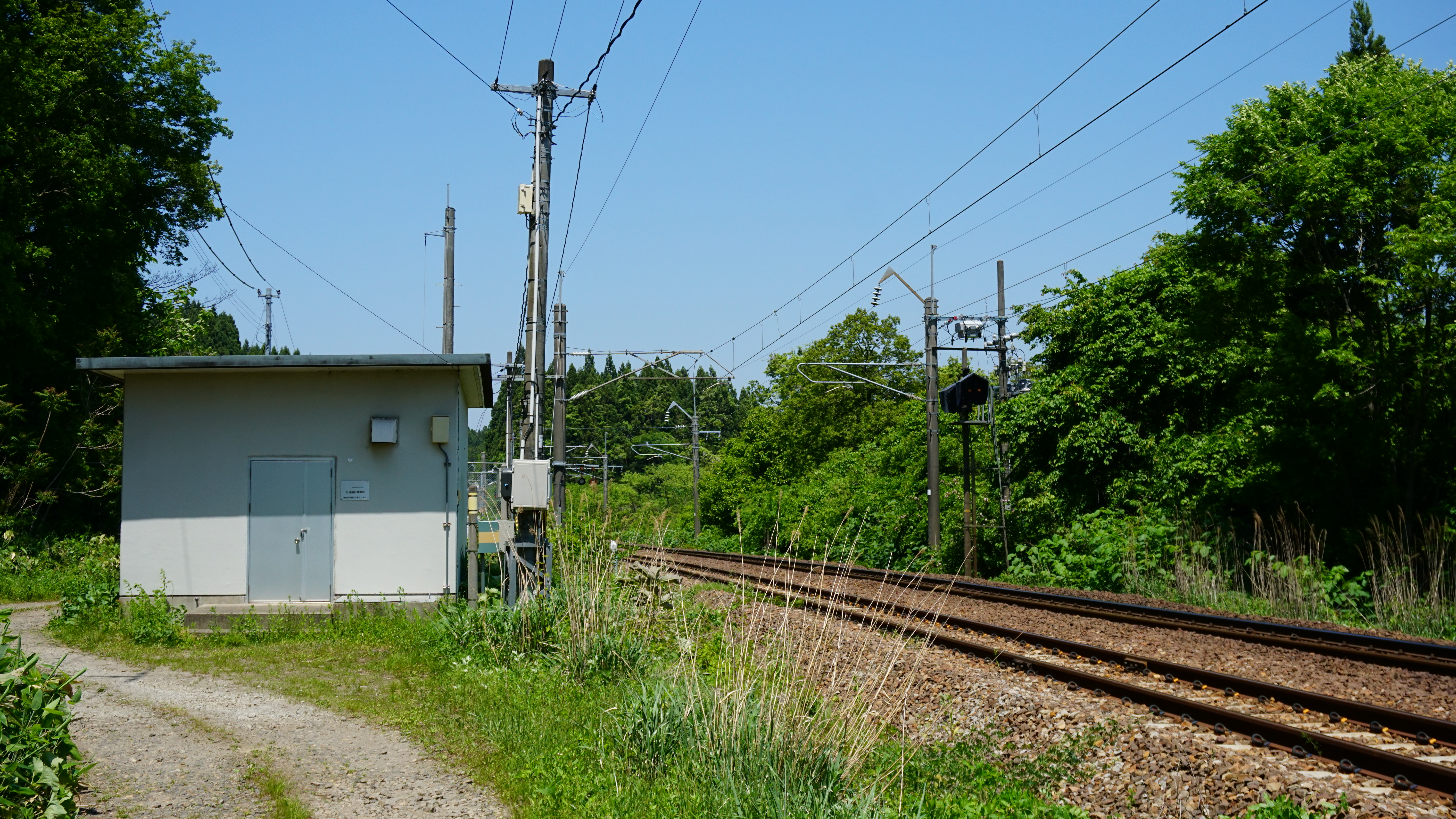 奥羽本線・南能代信号場（秋田県能代市、北金岡～東能代間）